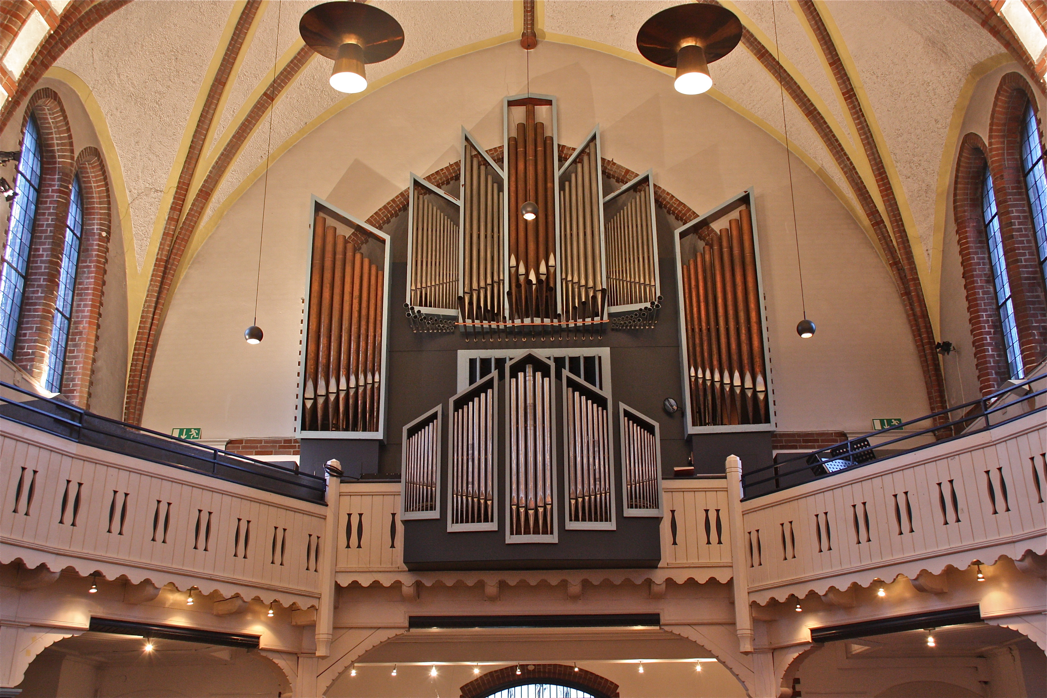 Hamburg, Wandsbek, Kreuzkirche, Innenraum, Orgel, Kemper 1963